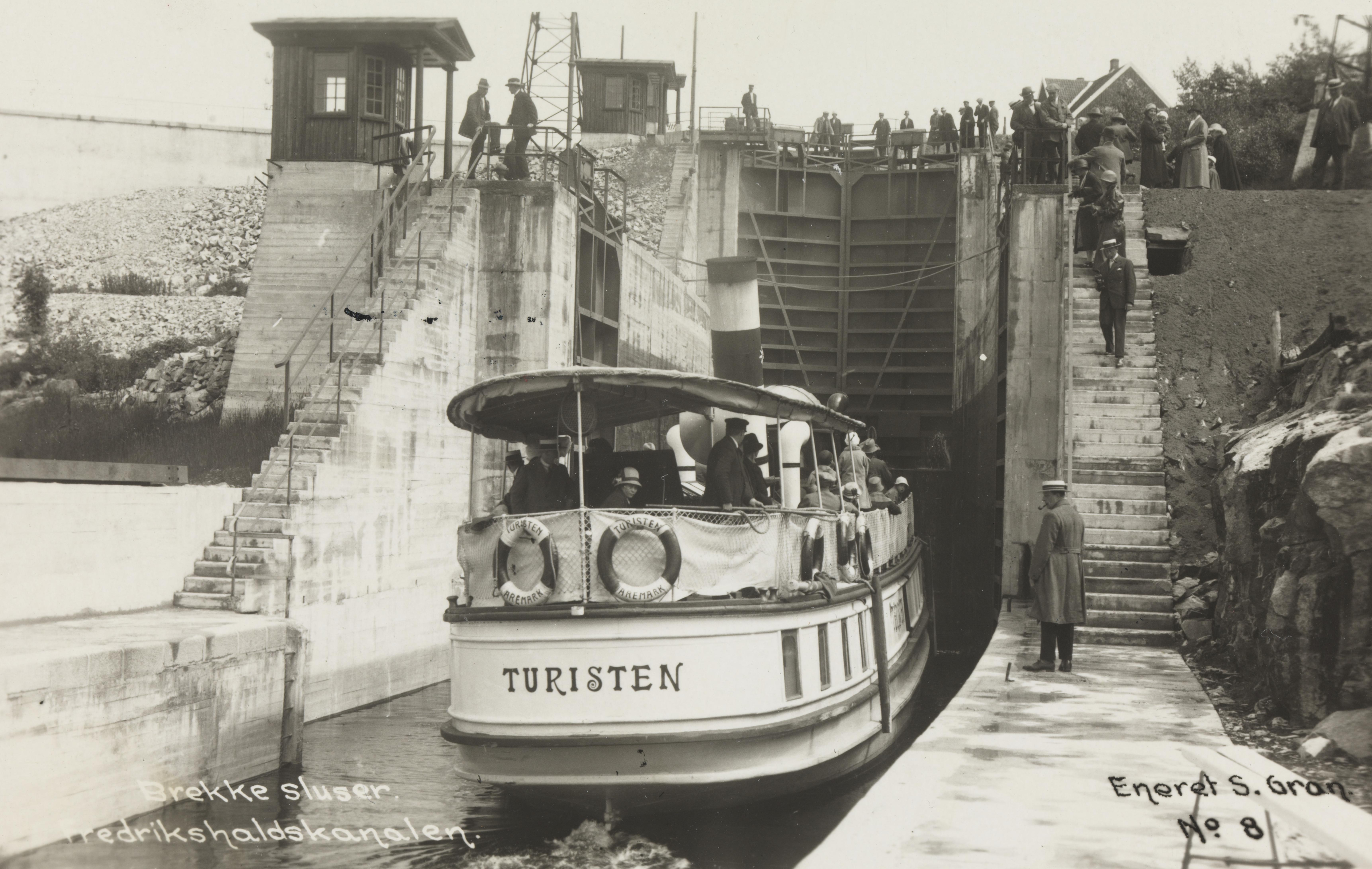 Bildet er hentet fra Nasjonalbibliotekets bildesamling Brekke,Brekke sluser, Halden, Østfold